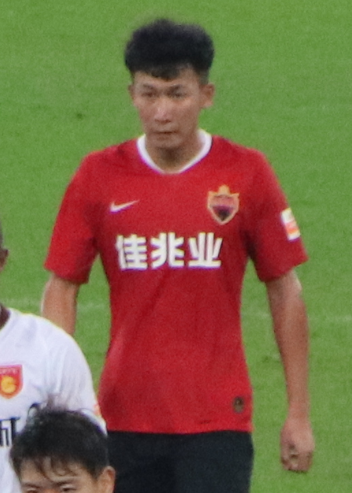 中文（中国大陆）: 深圳佳兆业球员：张远